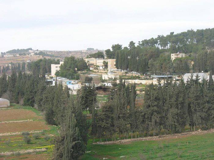 صورة لمدرسة العروب الزراعية, المدرسة الزراعية الثانوية في فلسطين في الجنوب تآسست عام 1964 تصوير أحمد نجار 2006